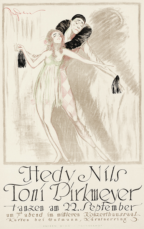 Werbeplakat: Hedy Nils (= Hedy Pfundmayr) & Tony Birkmeyer tanzen am 22. 09.1920 - Konzerthaussaal Wien. Größe 88,2 x 55,6 cm.